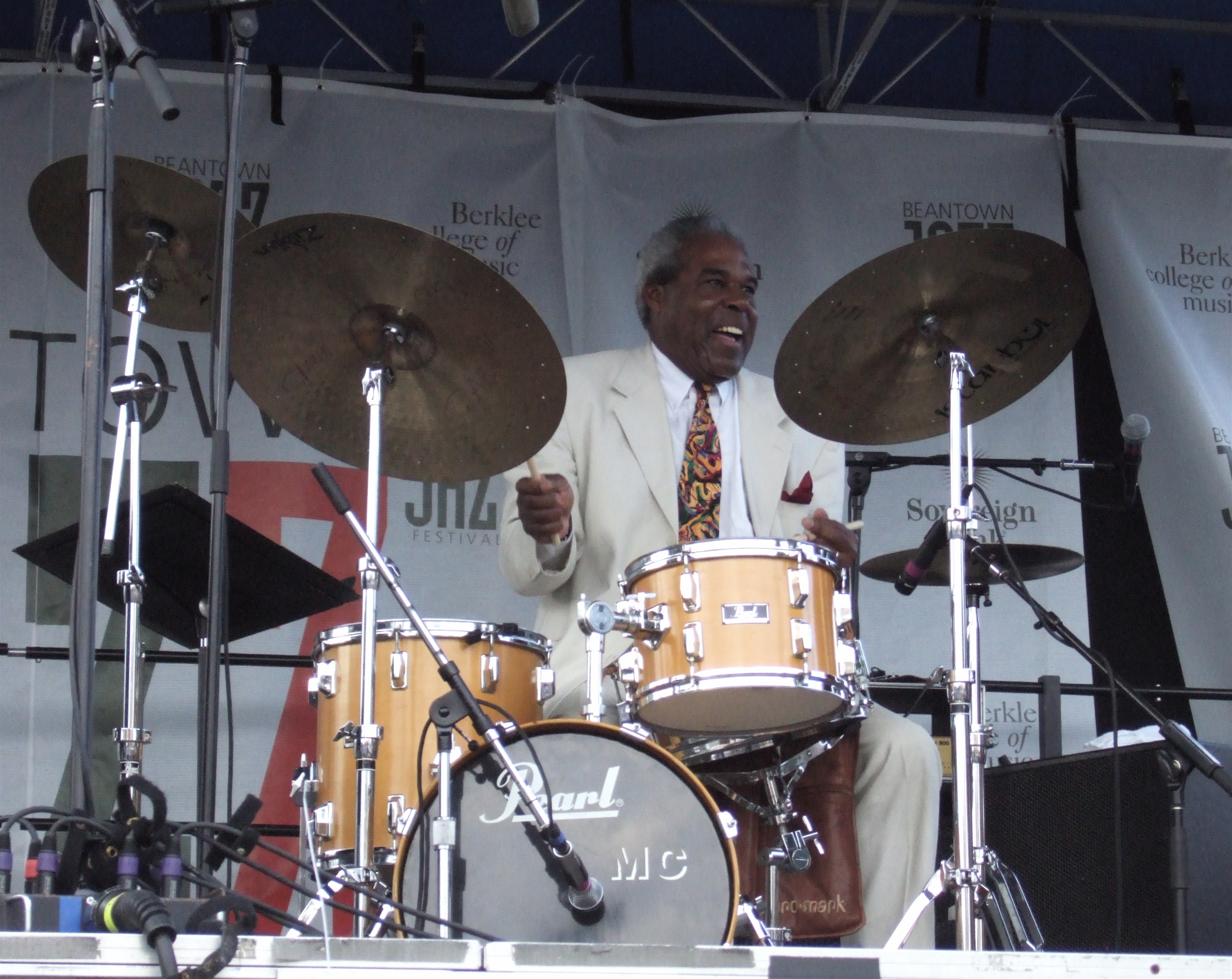 Michael Carvin (jazz drummer)